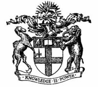 "Knowledge is power" це девіз на гербі Школи східних і африканських досліджень в Лондоні.